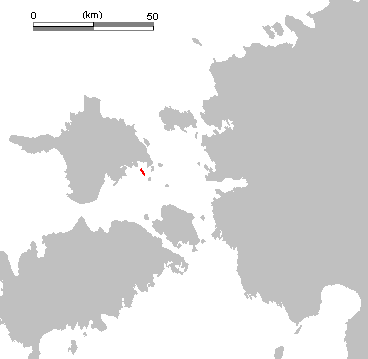 Saarnaki laid